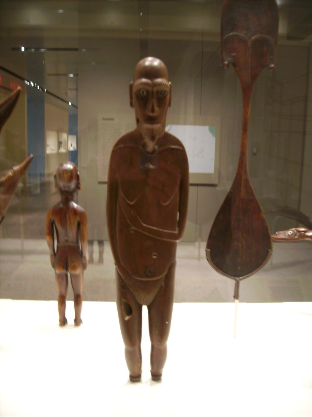 Moai Papa, Holzfigur von der Osterinsel (H. ca. 60 cm); Metropolitan Museum of Art, New York City